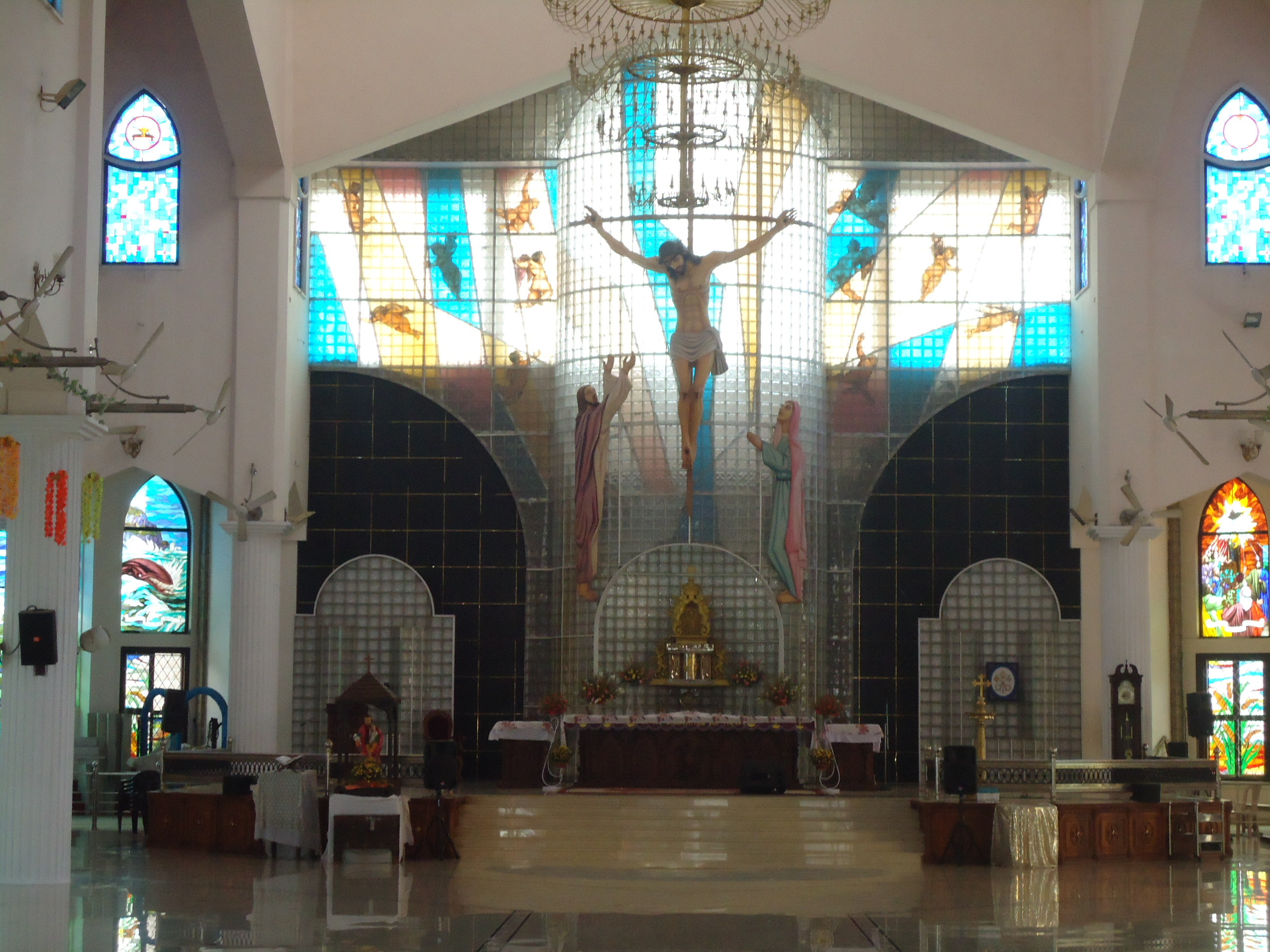 St George Basilica Church Altar Angamaly